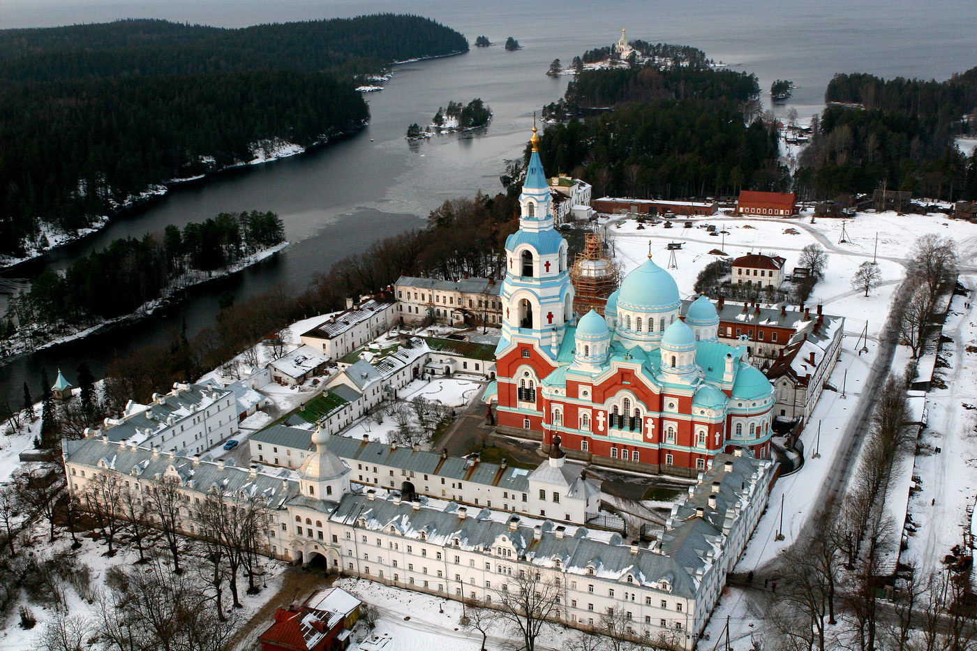 Монастырь Валаамский Спасо-Преображенский (Валаамский государственный историко-архитектурный и природный музей-заповедник) (Республика Карелия, Сортавала, о. Валаам, о. Лембос, о. Никольский, о. Святой, о. Скитский)